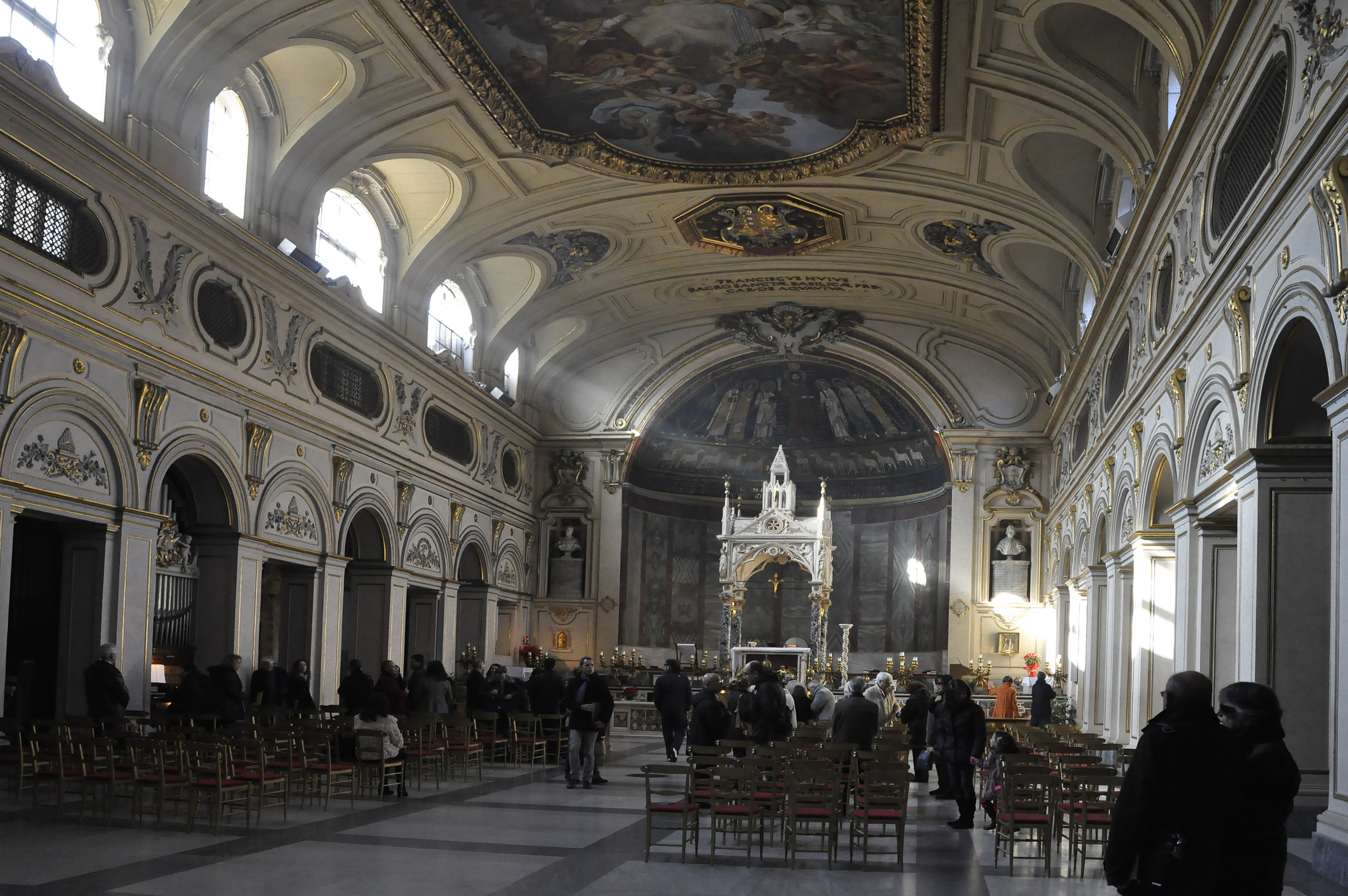 Santa Cecilia in Trastevere, Rome